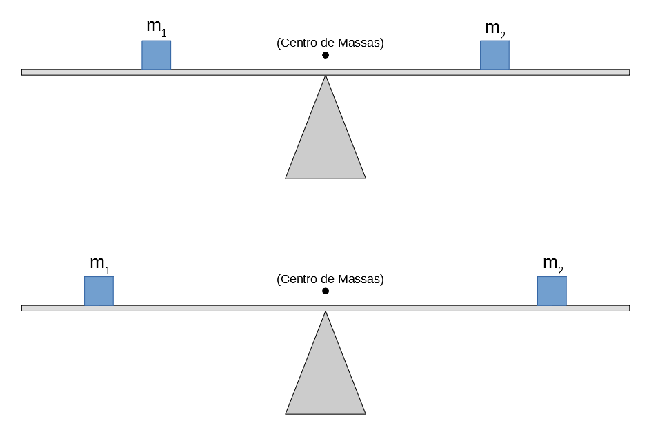 A imagem demonstra a descoberta de Arquimedes, revelando a possibilidade de colocar pesos em várias posições em uma alavanca, sendo o que realmente muda o equilíbrio é aonde se encontra o Centro de Massa. Portanto, é possível considerar o Centro de Massa como um objeto exercendo uma força-peso em um determinado ponto.